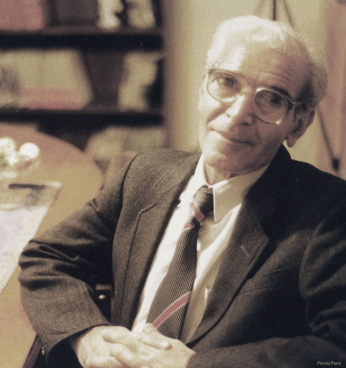 احمد حیدربیگی - نوروز در همدان